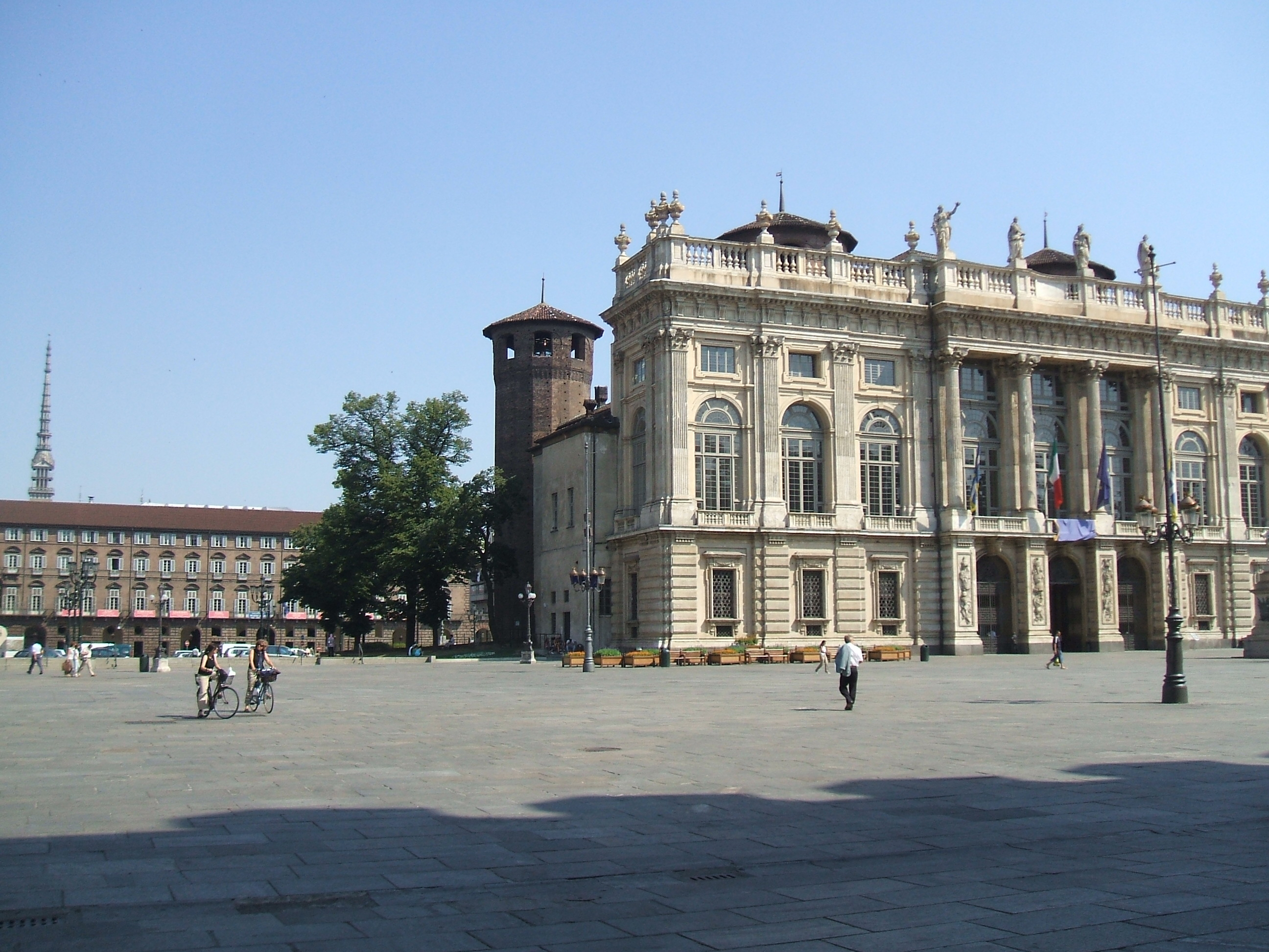 scorcio di Piazza Castello, a Torino, con, in lontananza, la guglia della Mole Antonelliana